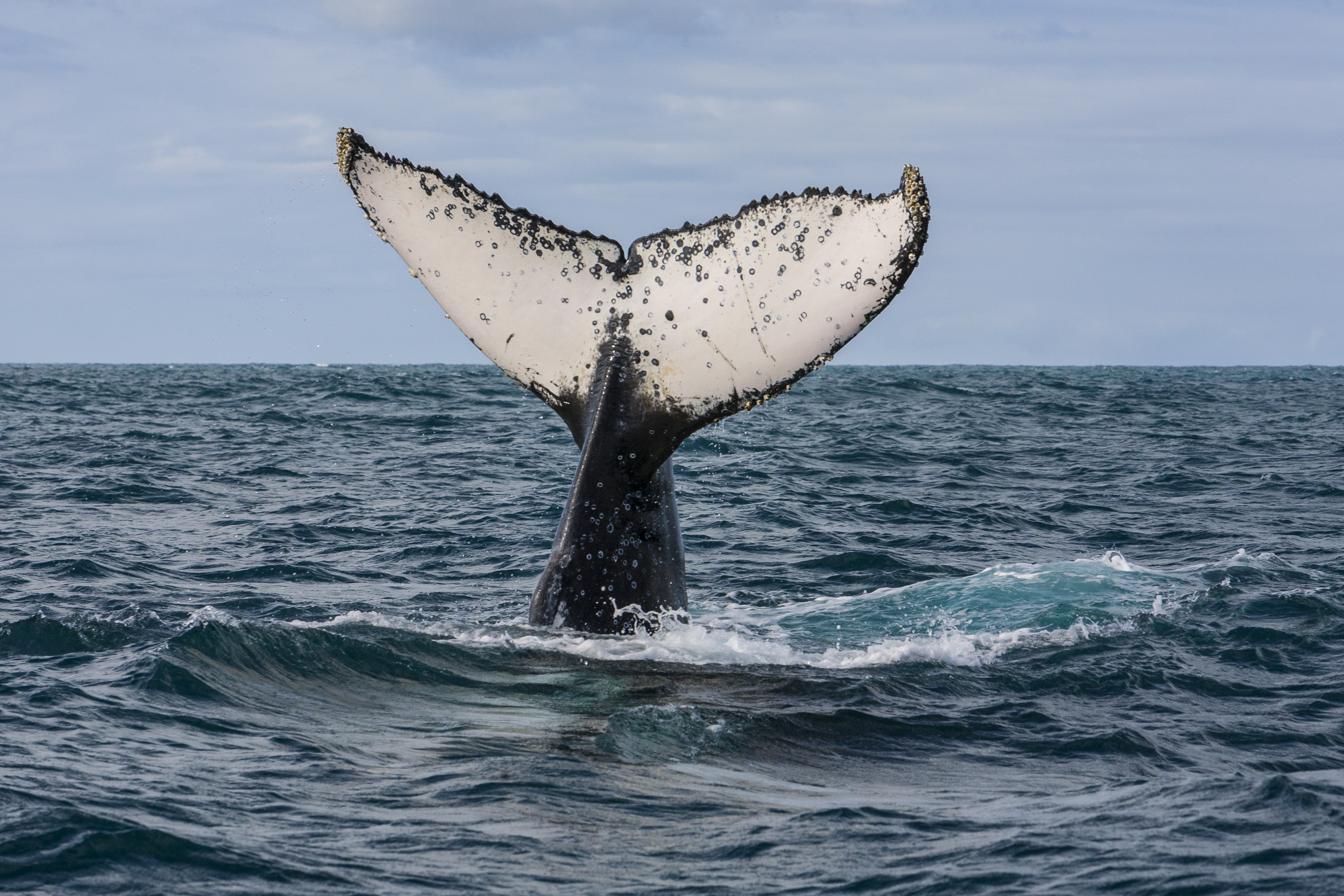 Mergulhando